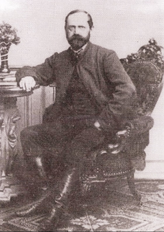 Hertelendi és vindornyalaki Hertelendy Kálmán Rudolf (1820–1875) honvédszázados, országgyűlési képviselő, Zala vármegye főispánja, földbirtokos, a "Zalavármegyei Gazdasági Egyesület" ügyvezető elnöke.